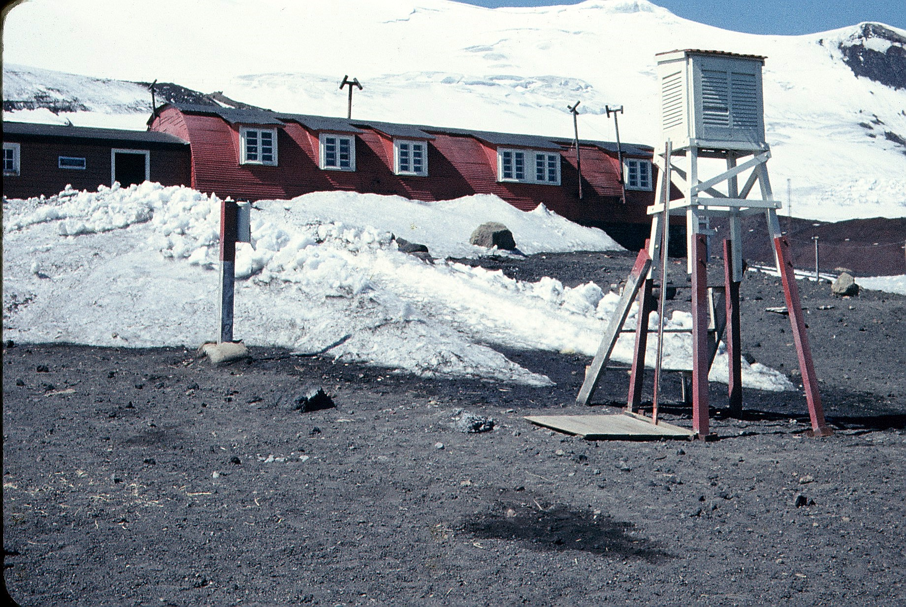 Base Pedro Aguirre Cerda a cargo de la Fuerza Aérea de Chile. Caleta Péndulo, bahía Foster, isla Decepción.